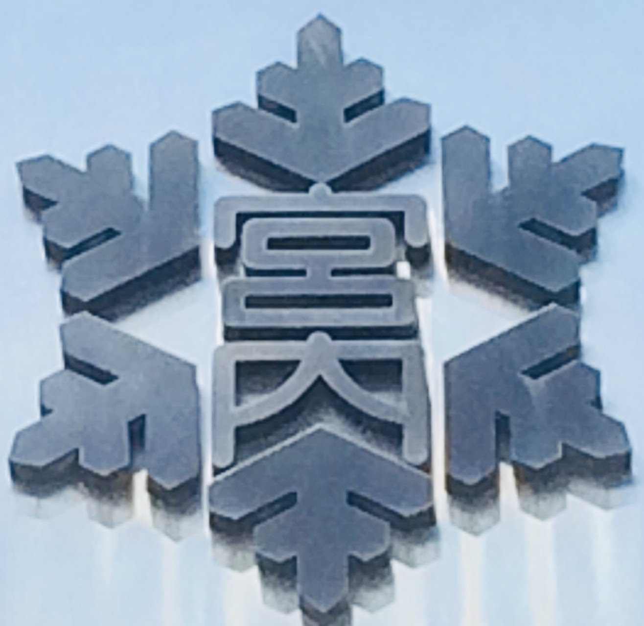 宮内小学校・校章